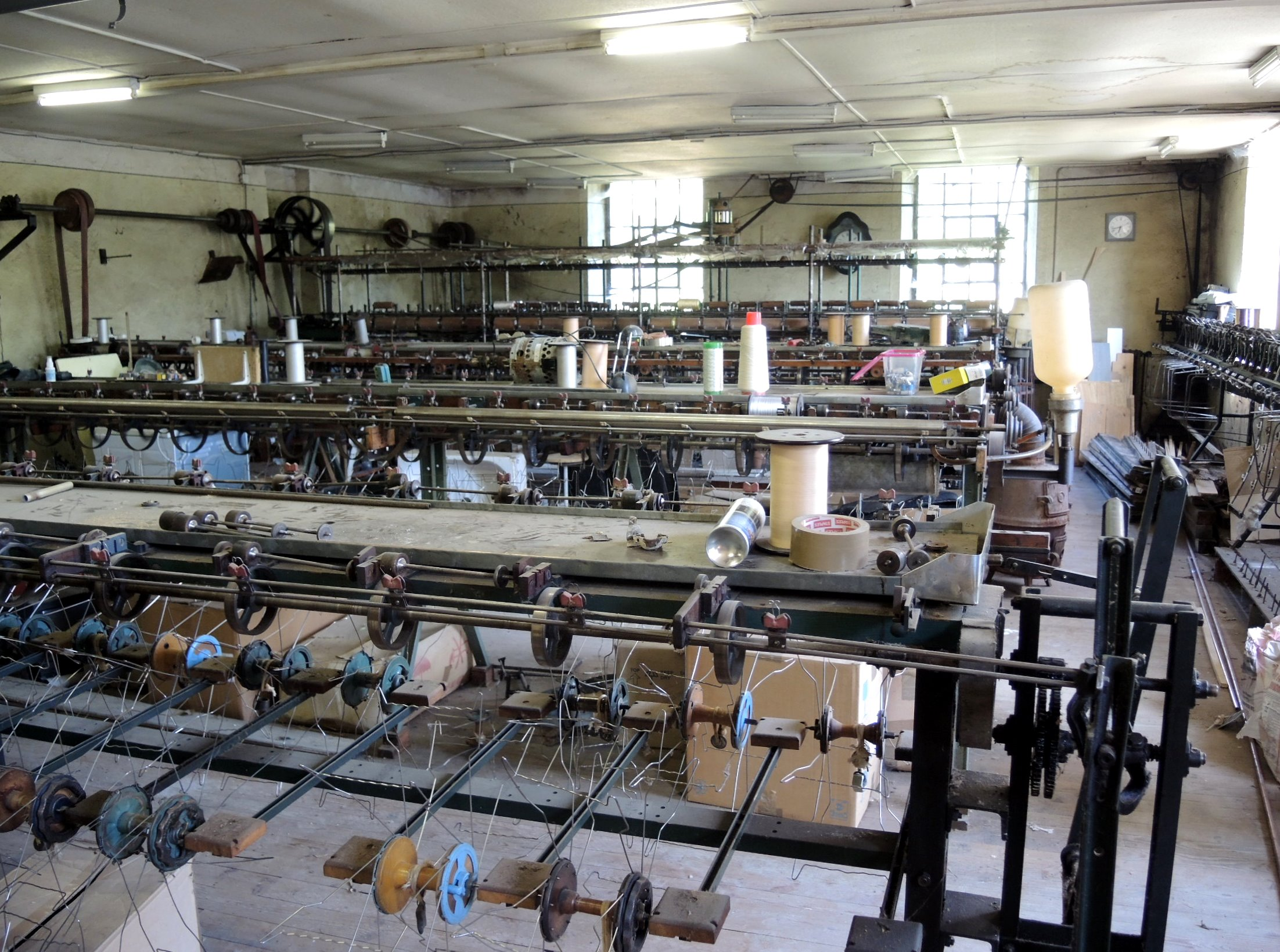 Vinzieux détail